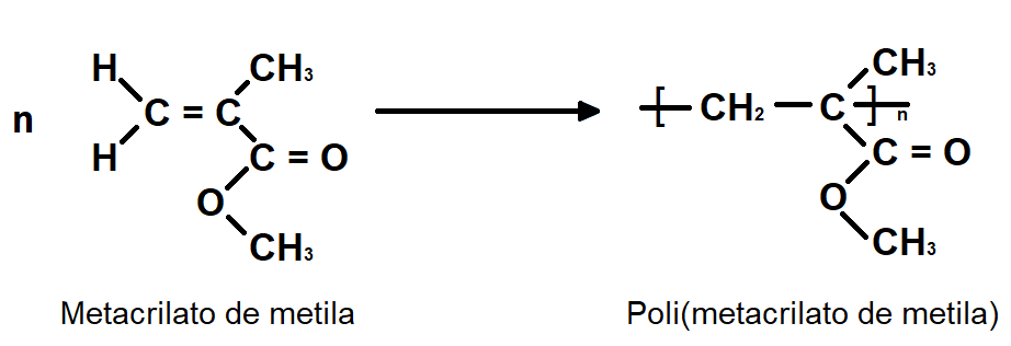 A imagem descreve a síntese do Poli(metacrilato de metila) ou (PMMA) a partir de seu monômero metil metacrilato ou metacrilato de metila.